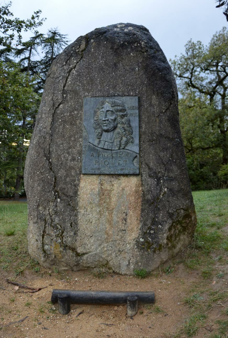 Stèle dédié à Riquet à Saint Ferreol